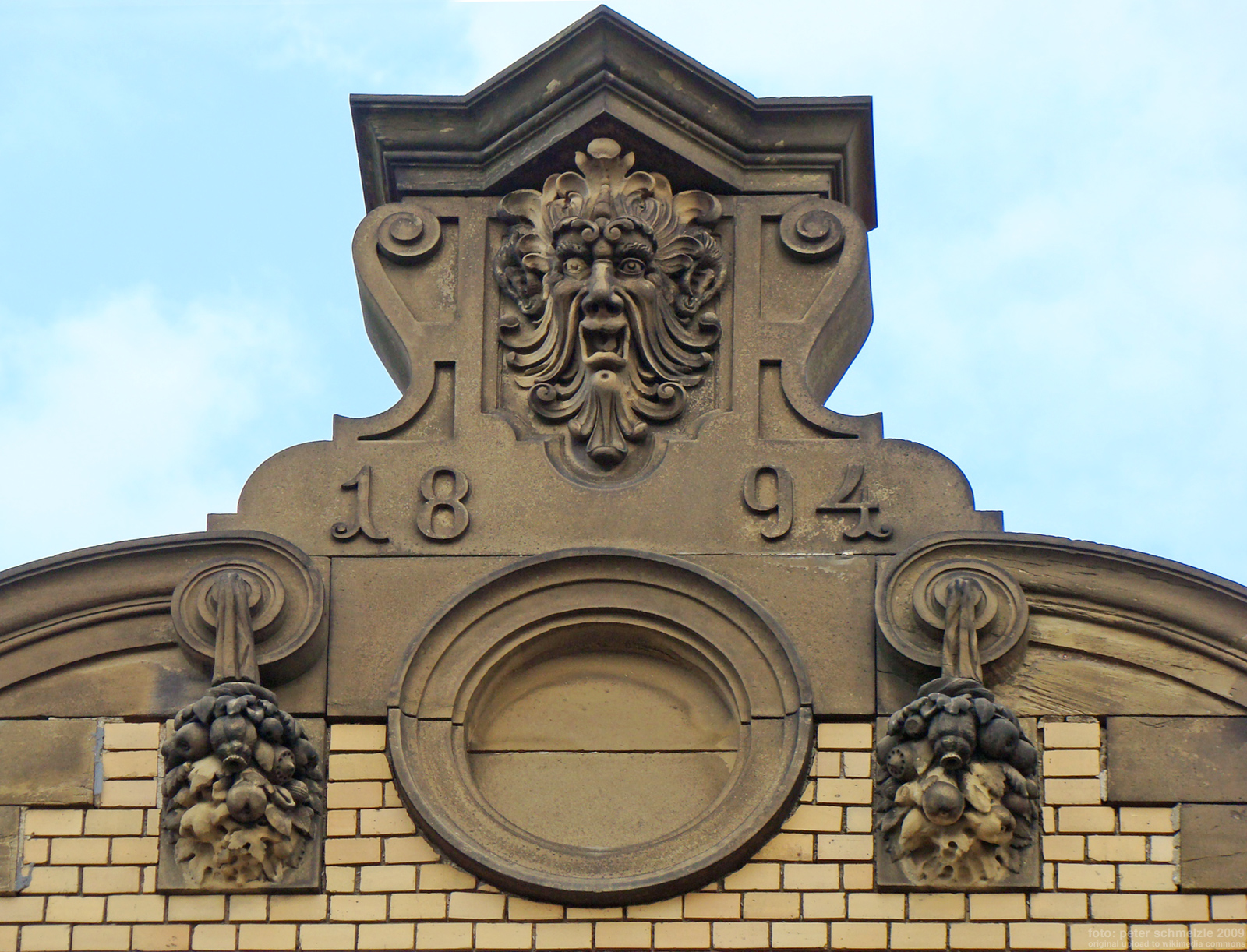 Uhlandstraße 57 in Heilbronn, Fassadendetail